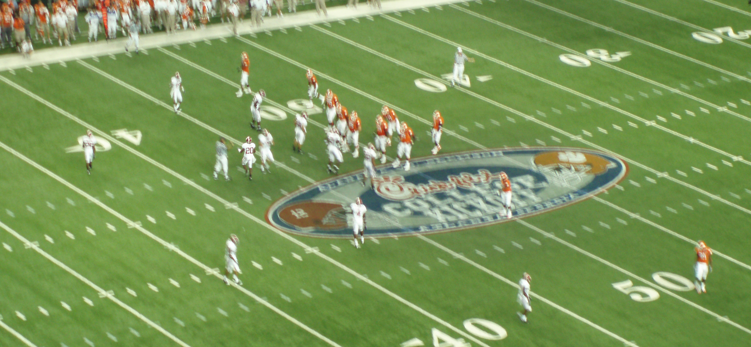 Alabama versus Clemson on 30 August 2008